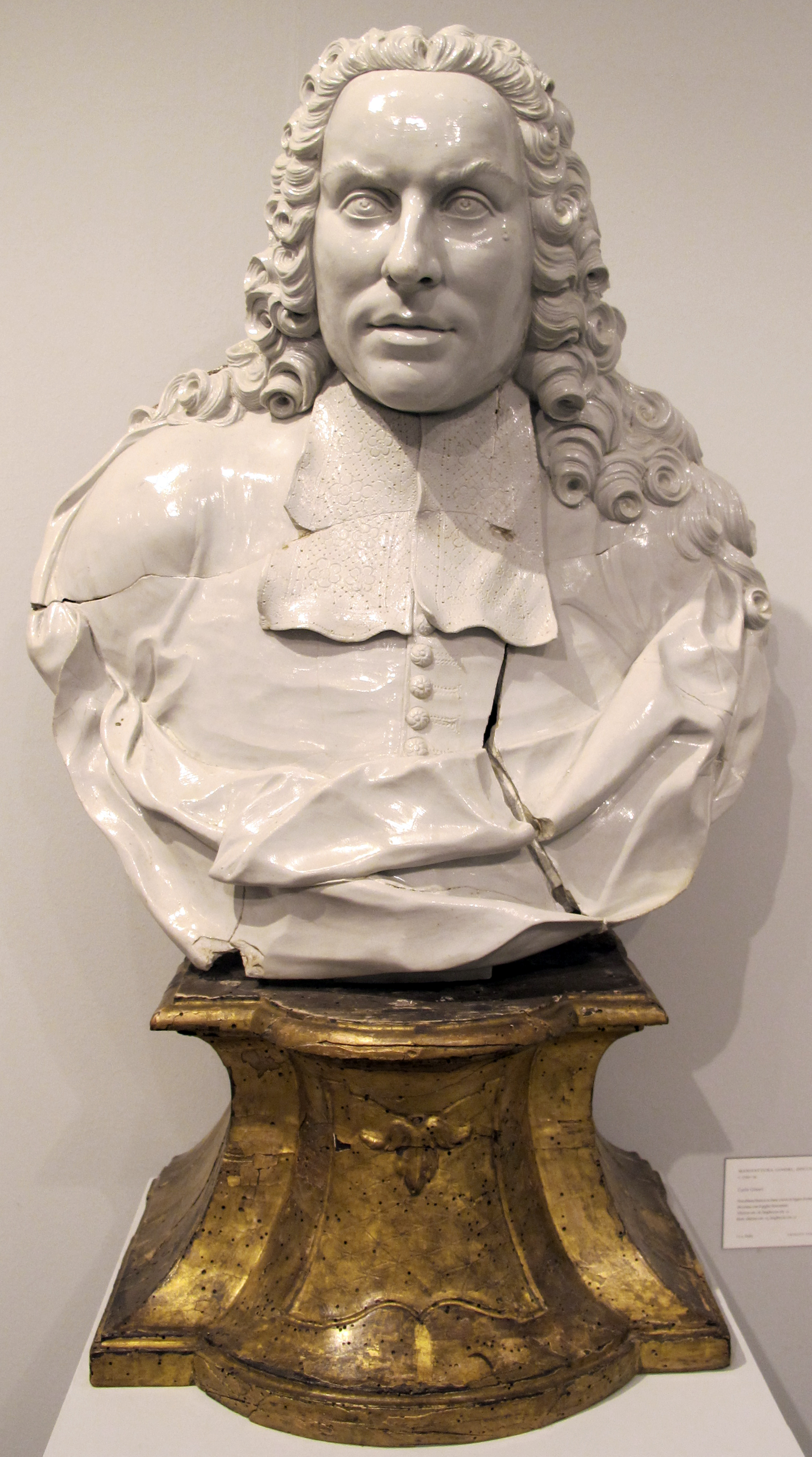 XXVIII Biennale dell'Antiquariato (2013), Courtesy of Trinity Fine Art